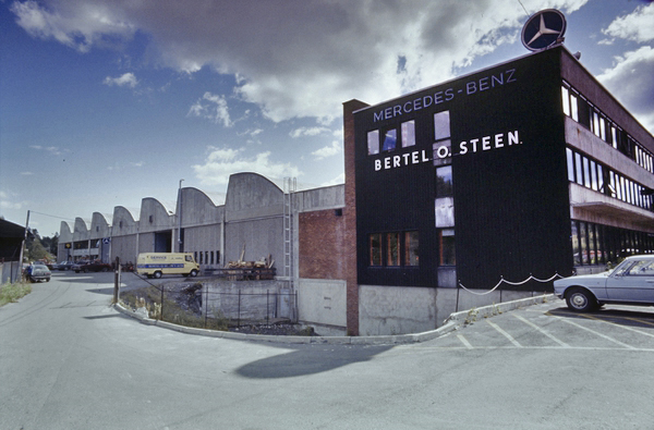 Bertel O. Steen bilforretning.